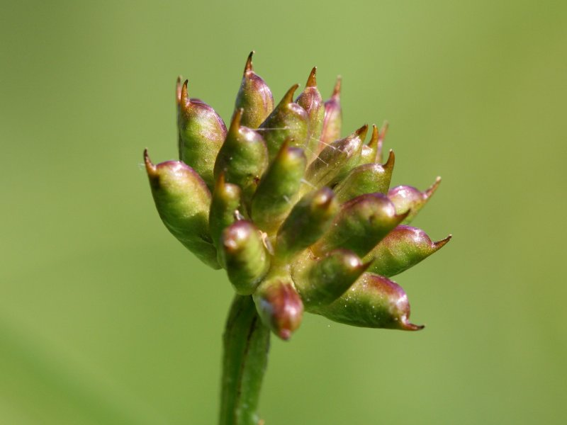 Trollblume (Trollius europaeus), Fruchtstand